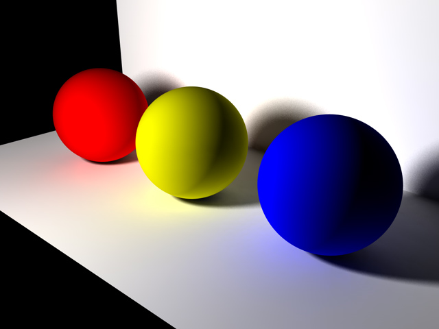 Raytracing Image mit Radiosity Erstellt von: Jakob Richter --Geierunited 22:53, 7. Jan 2005 (CET)